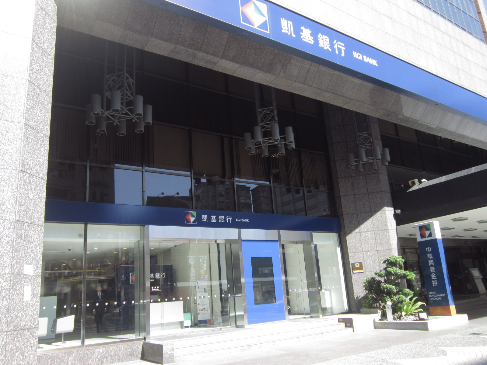 凱基商業銀行營業部，位於中華開發金控總部大樓一樓。